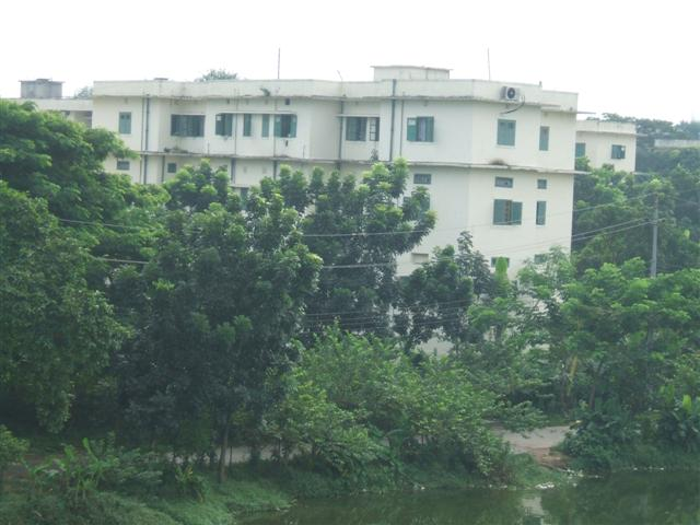 Azimpure Colony, Dhaka, Bangladesh.